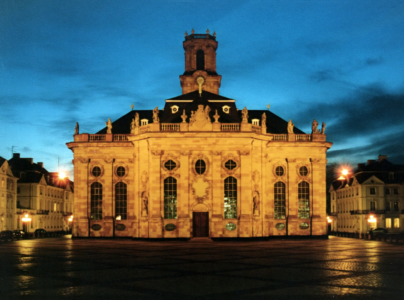 Ludwigskirche bei Nacht Haupteingang